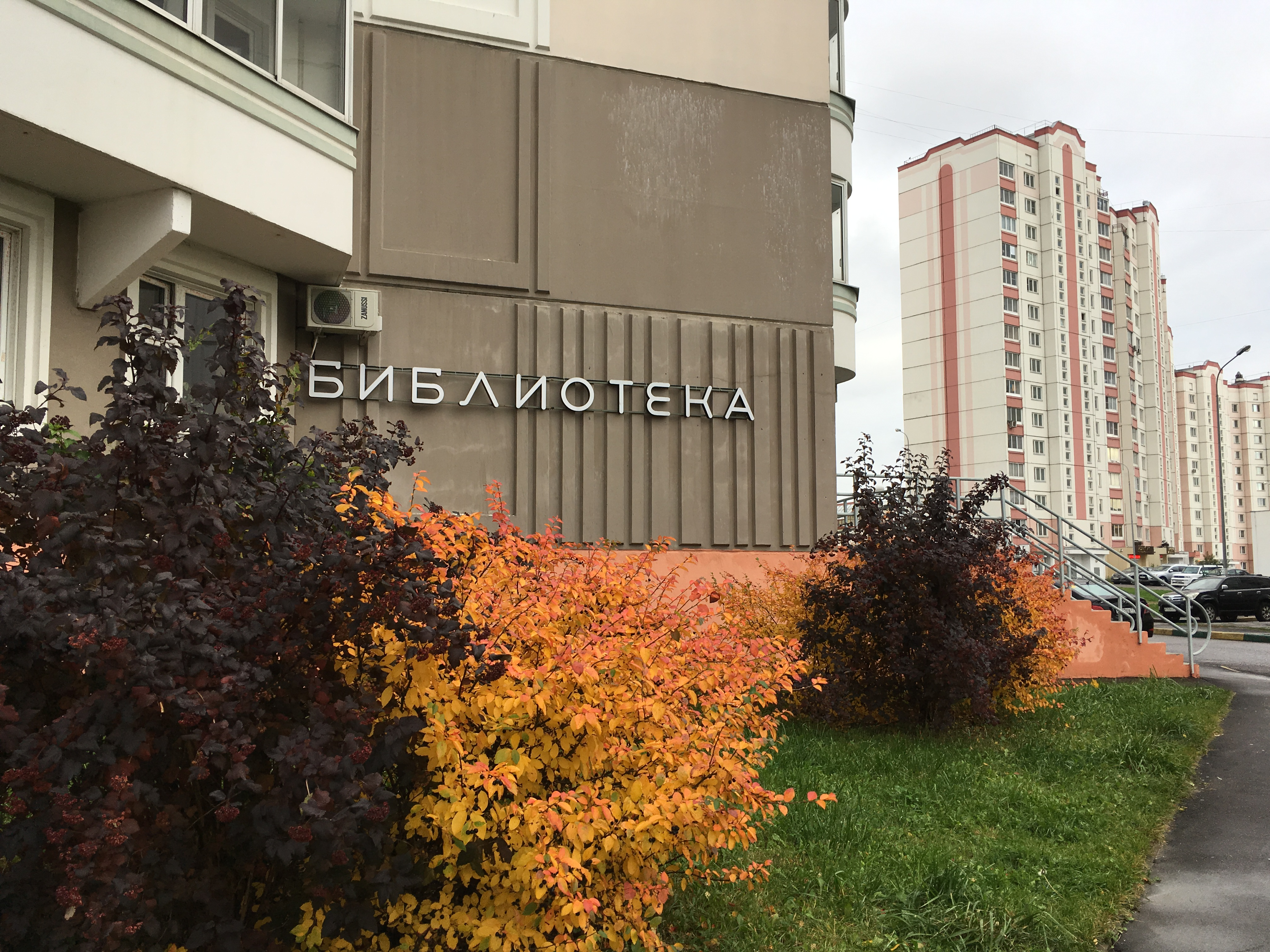 МОСКВА,ЮЖНОЕ БУТОВО, БИБЛИОТЕКА-НА-ИЗЮМСКОЙ БИБЛИОТЕКА №194